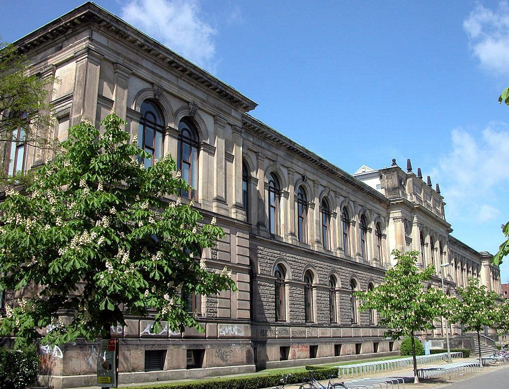 Braunschweig: Altes Gebäude der TU Braunschweig